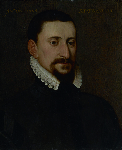 Pieter I Pourbus, Portret van een man (Dominicus Lampsonius?), 1565, olieverf op paneel, 31 x 25,3 cm.